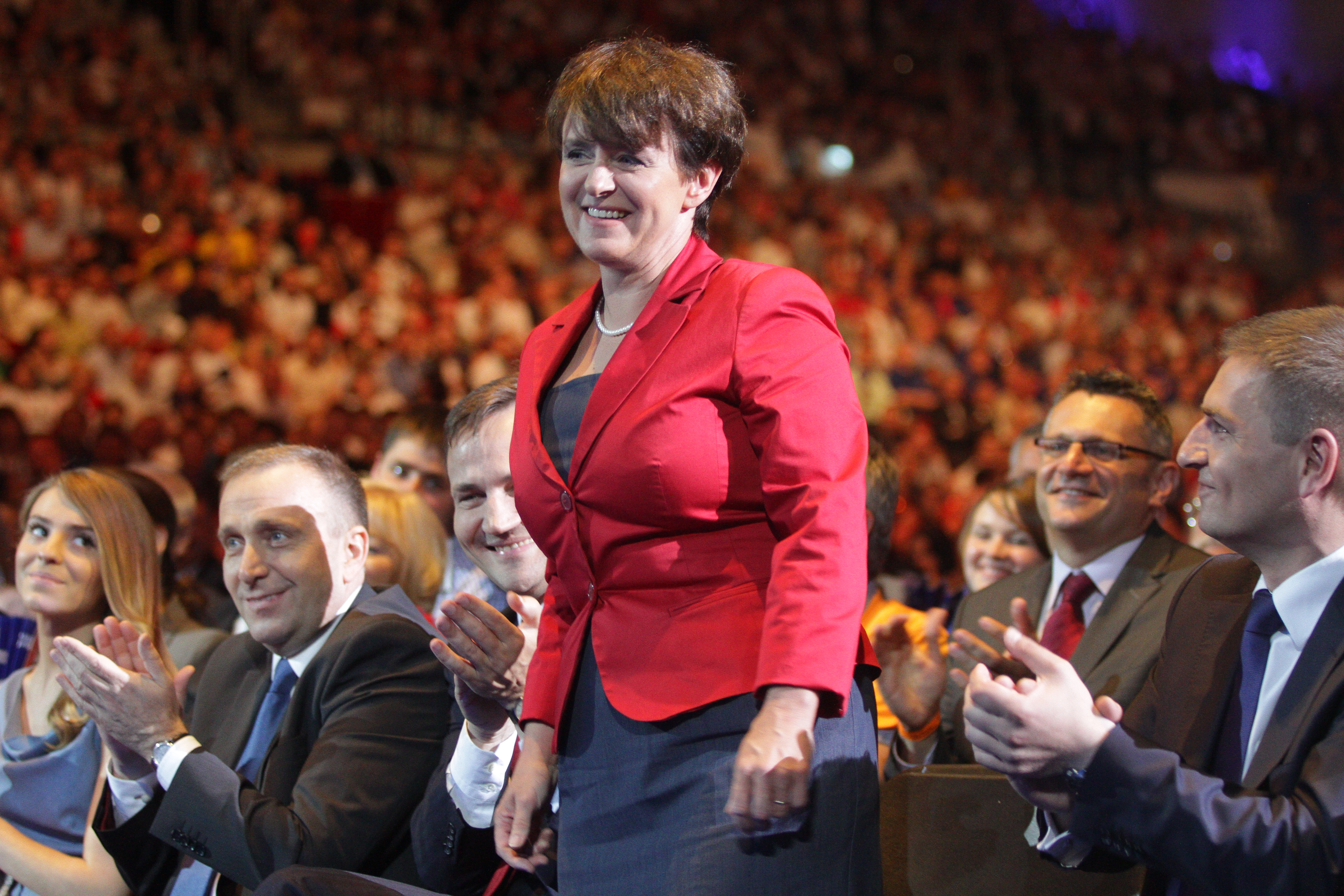 Ogólnopolska Konwencja Platformy Obywatelskiej Ergo Arena 11.06.2011